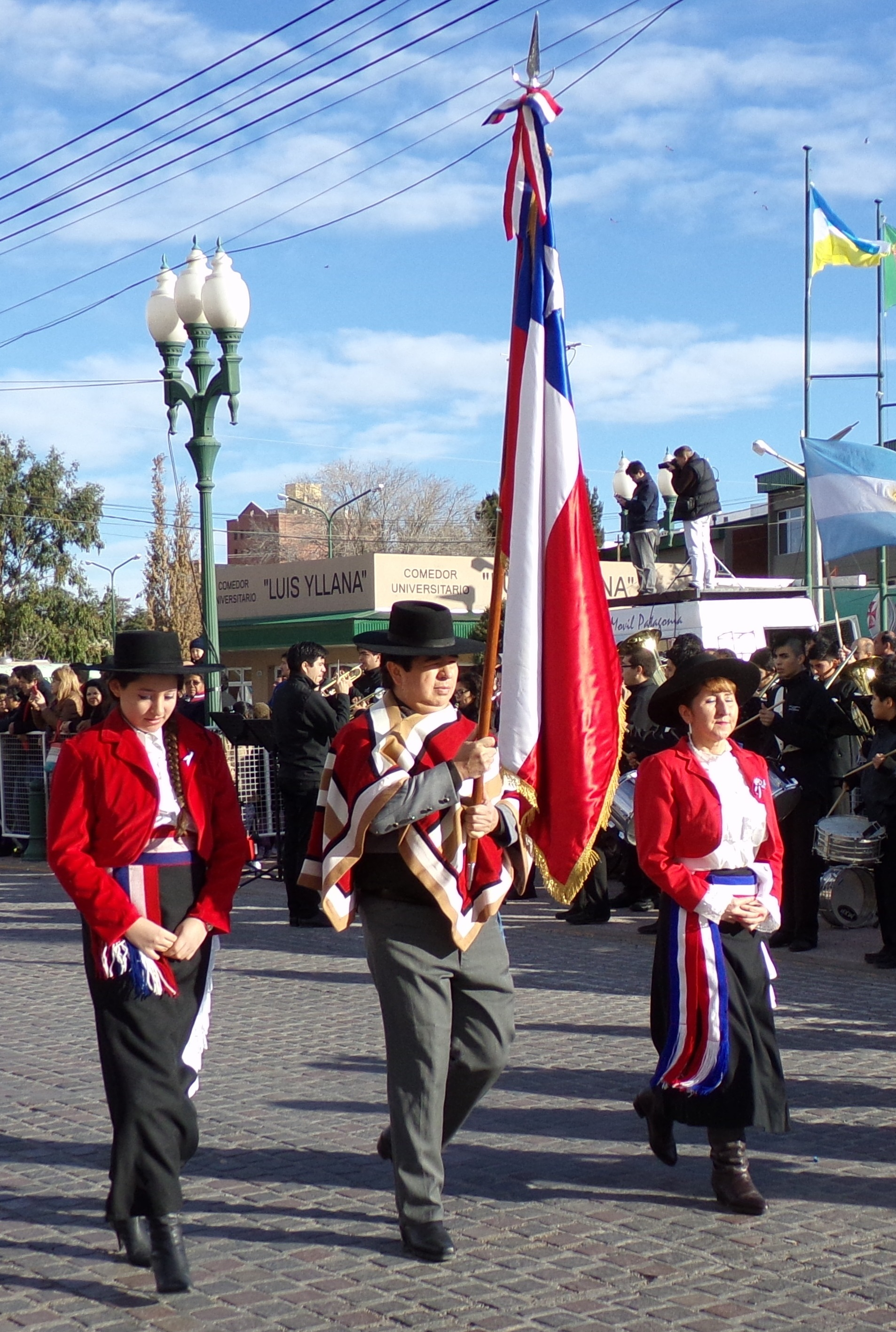 Colectividad chilena de Trelew, Argentina, durante el desfile del 25 de mayo de 2015